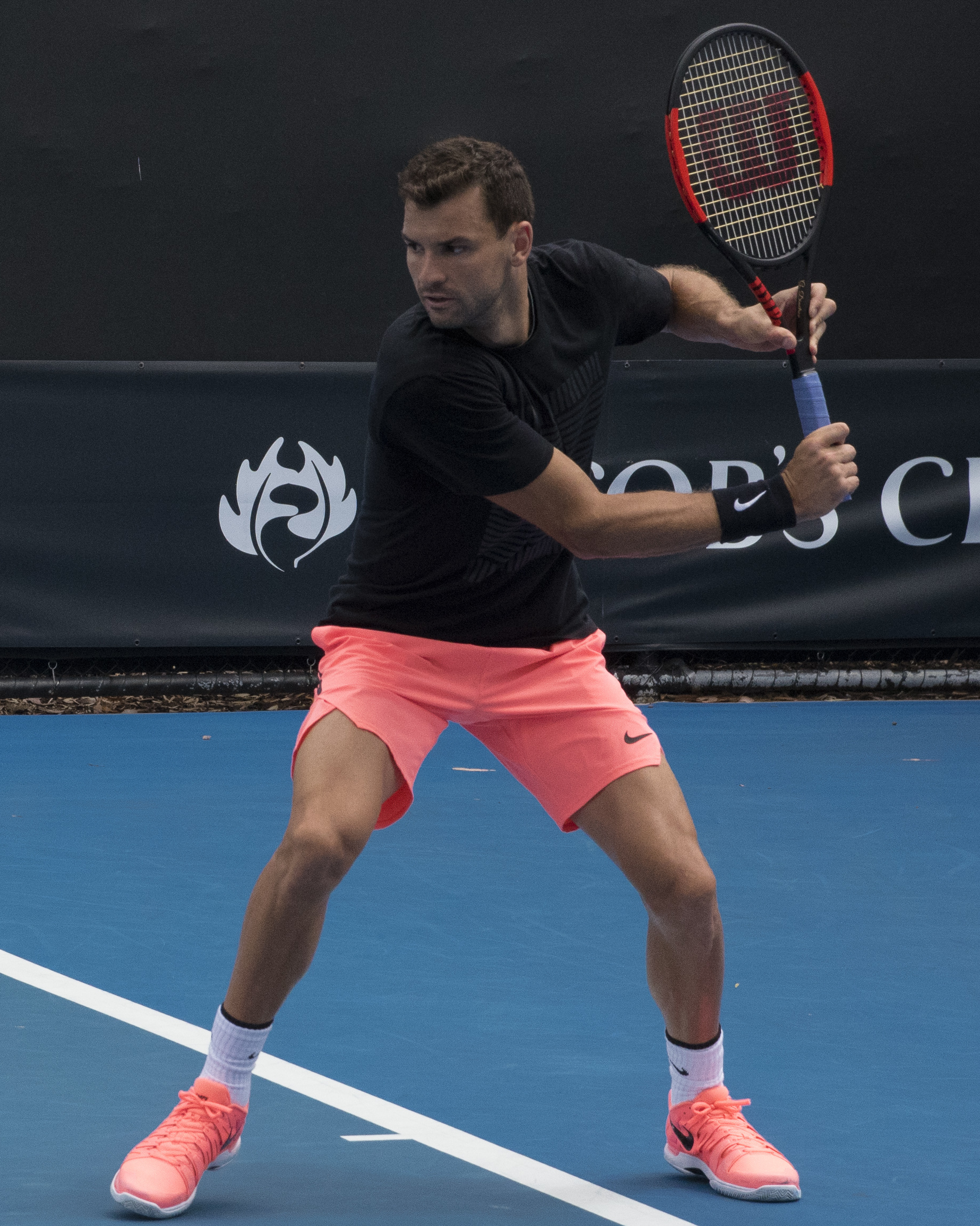 Grigor Dimitrov (Bul)